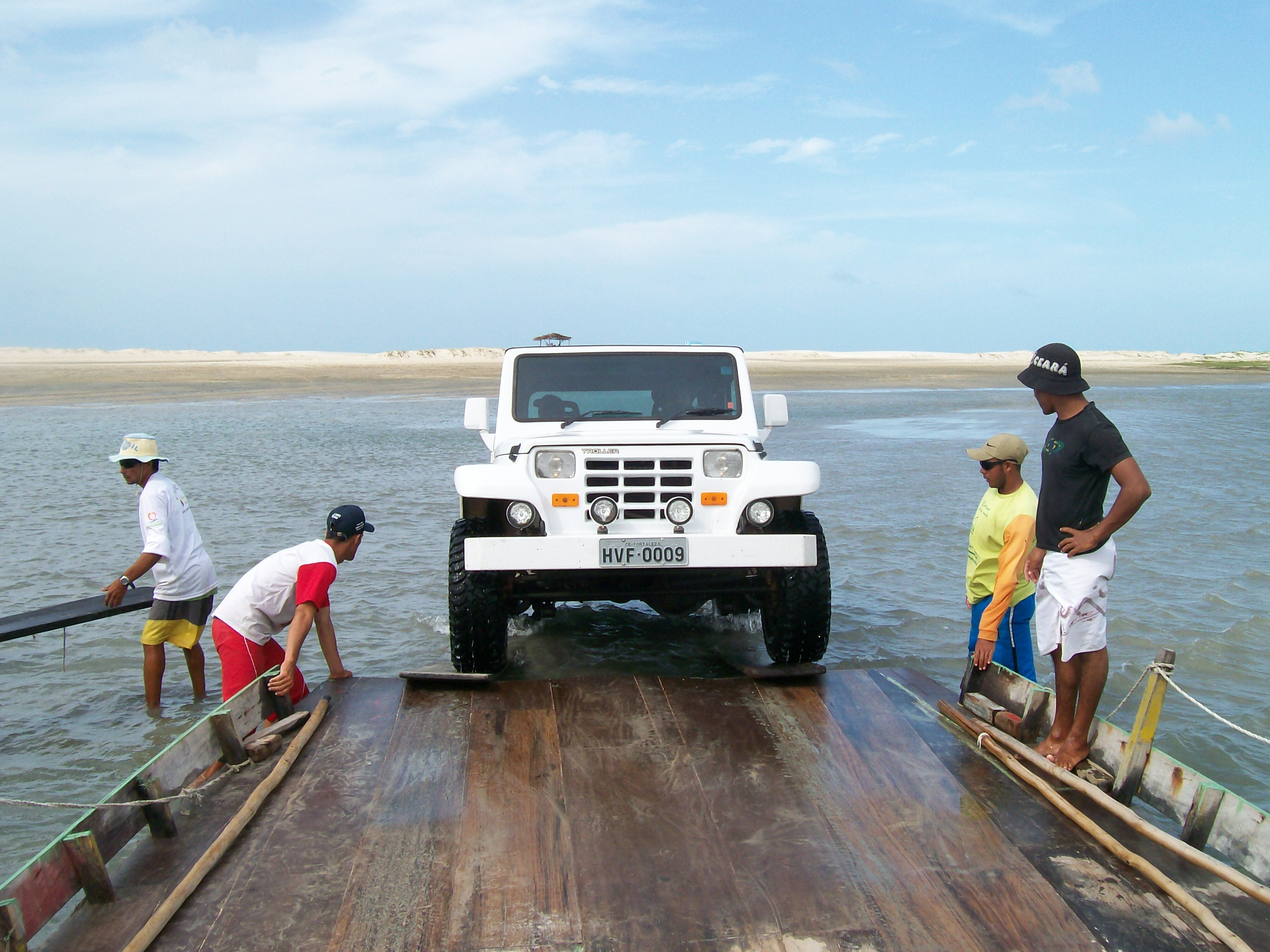 Embarque na balsa